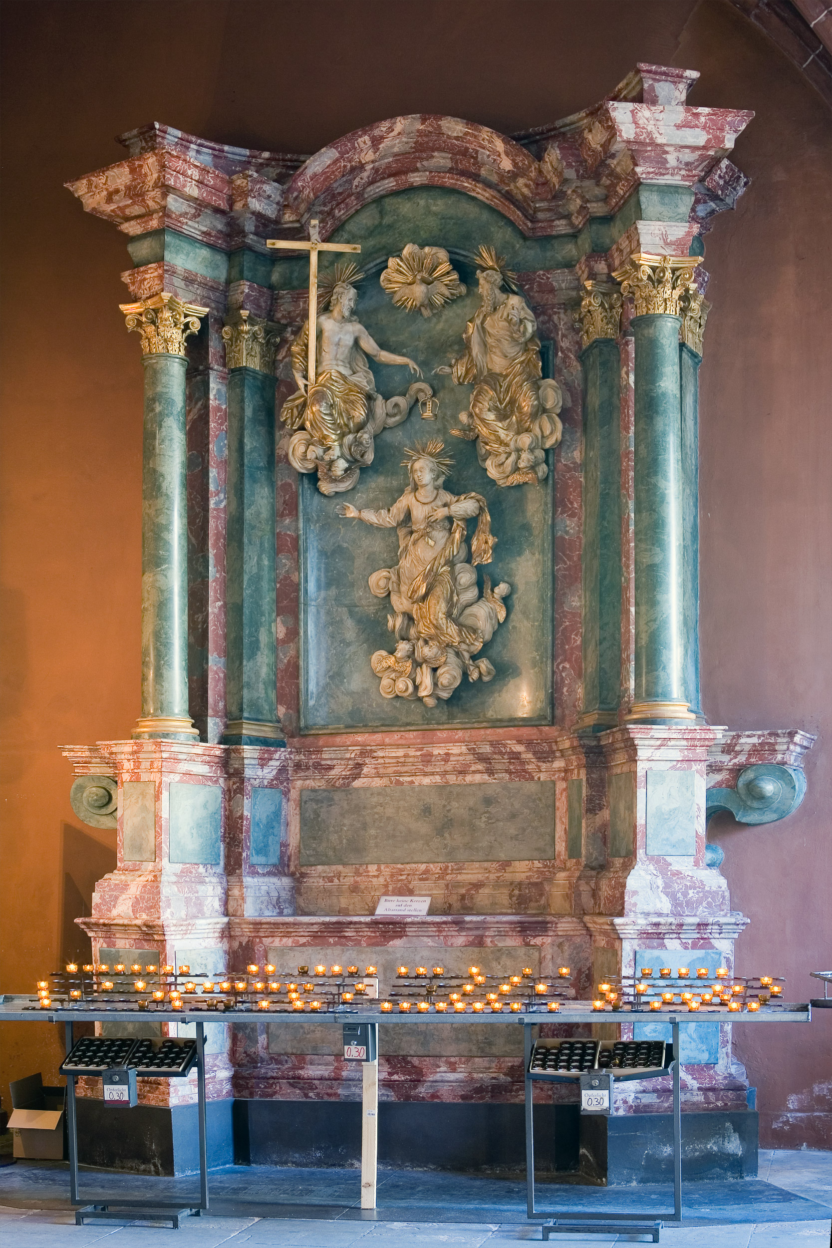 Barocker, 1728 vom Kanonikus und Stiftsdekan Johann Nikolaus Martinego gestifter Maria-Himmelfahrt-Altar in der Vorhalle des Kaiserdoms St. Bartholomäus in Frankfurt am Main. Selber fotografiert im Februar 2008, Doppellizensierung GFDL & CC-BY-SA 2.5.